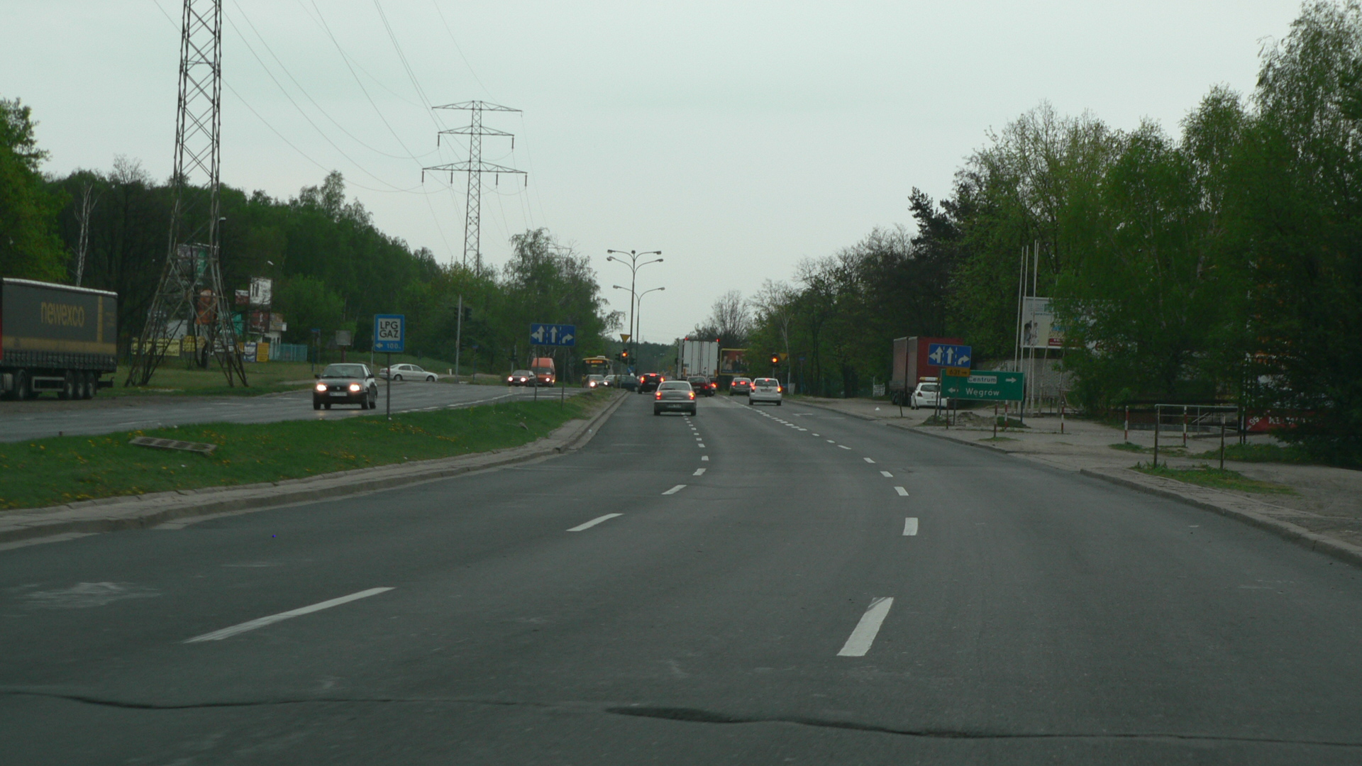 Ul. Żołnierska w Warszawie